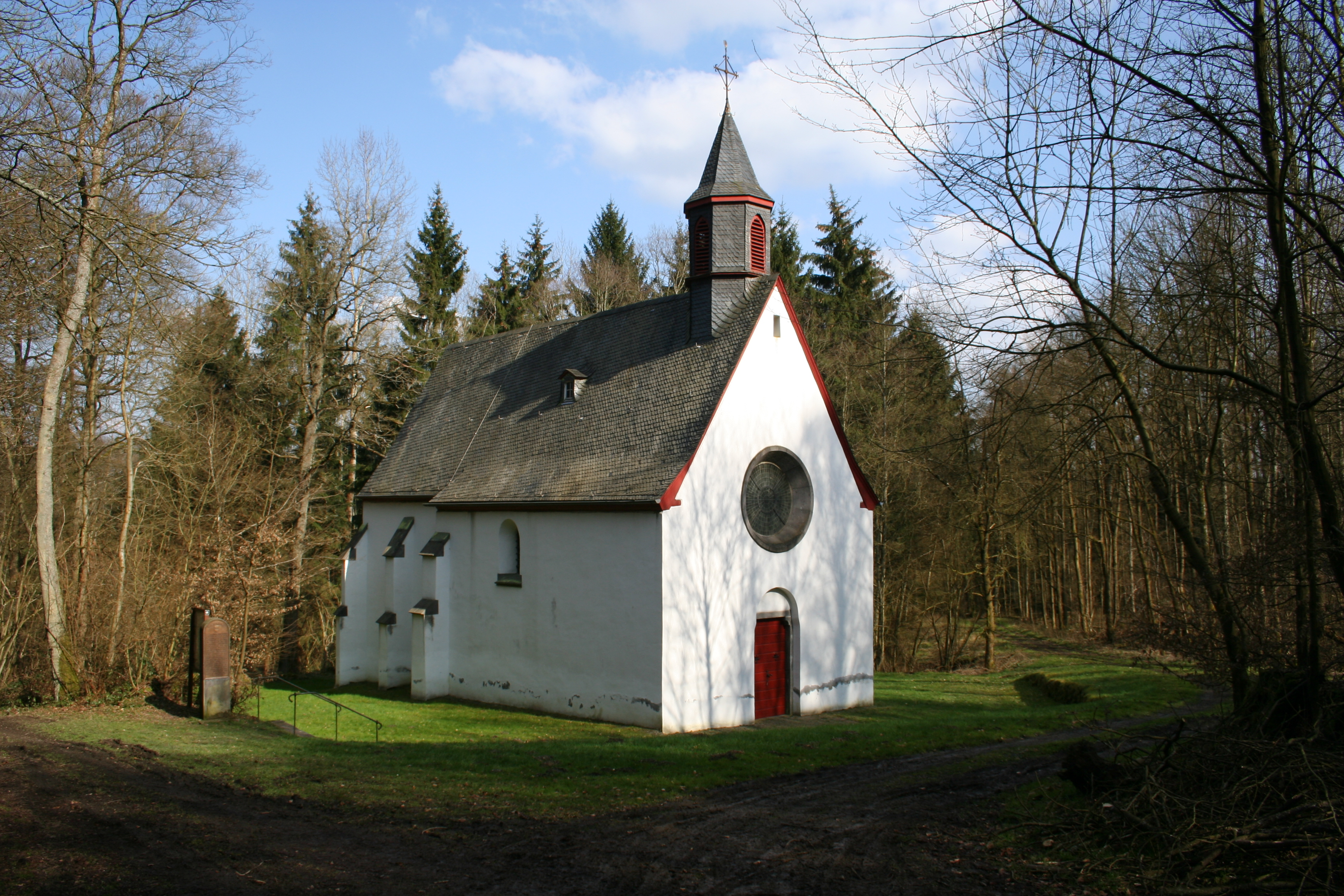 Kapelle Ütgenbach, Gemeinde Asbach